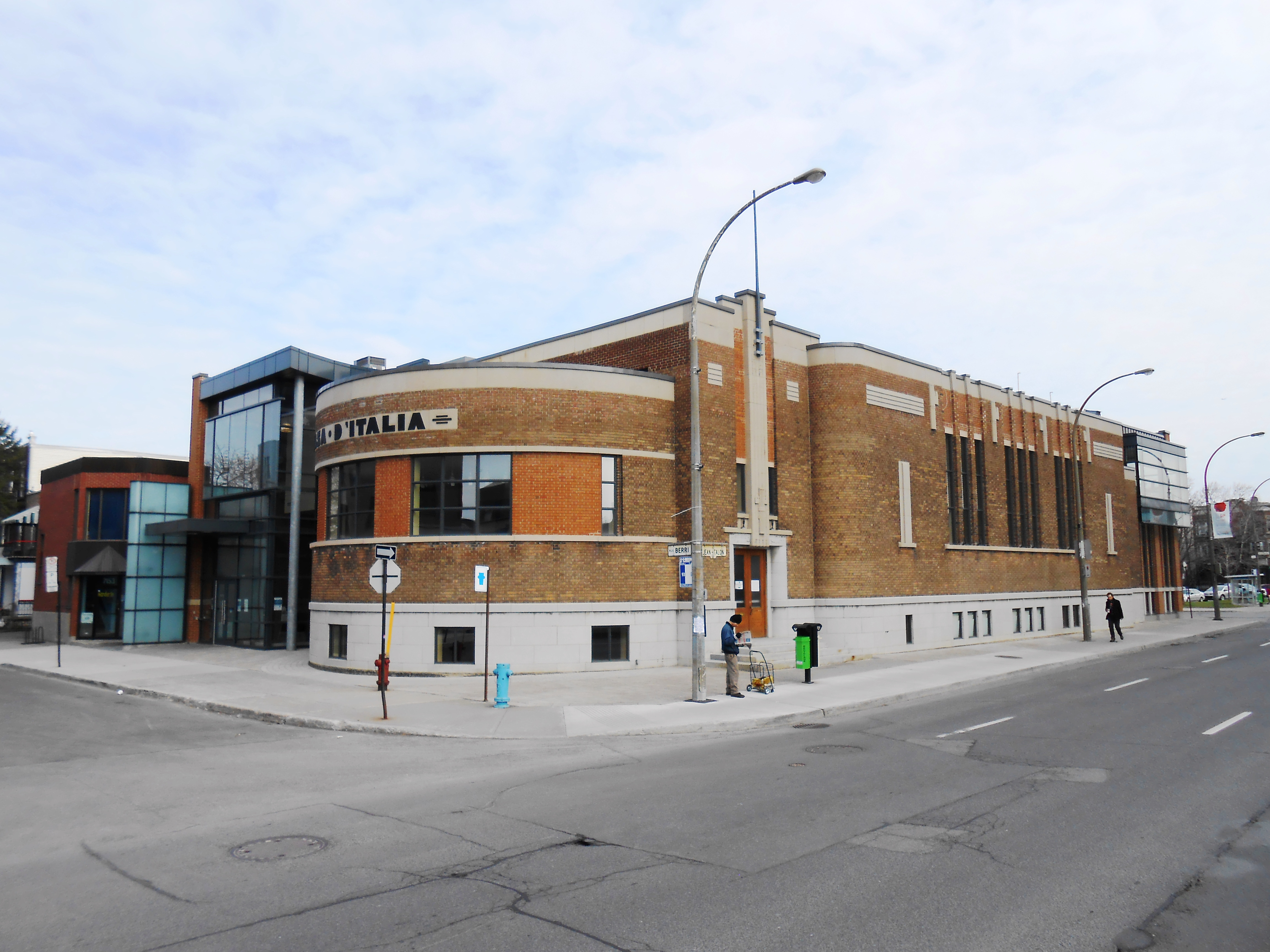 La Casa d'Italia ou Maison d'Italie est un bâtiment de Montréal situé au 505, rue Jean-Talon Est. Il fut construit en 1936 pour la communauté italienne habitant à proximité. LaPresse.ca : La Casa d'Italia ressuscite Images Montréal